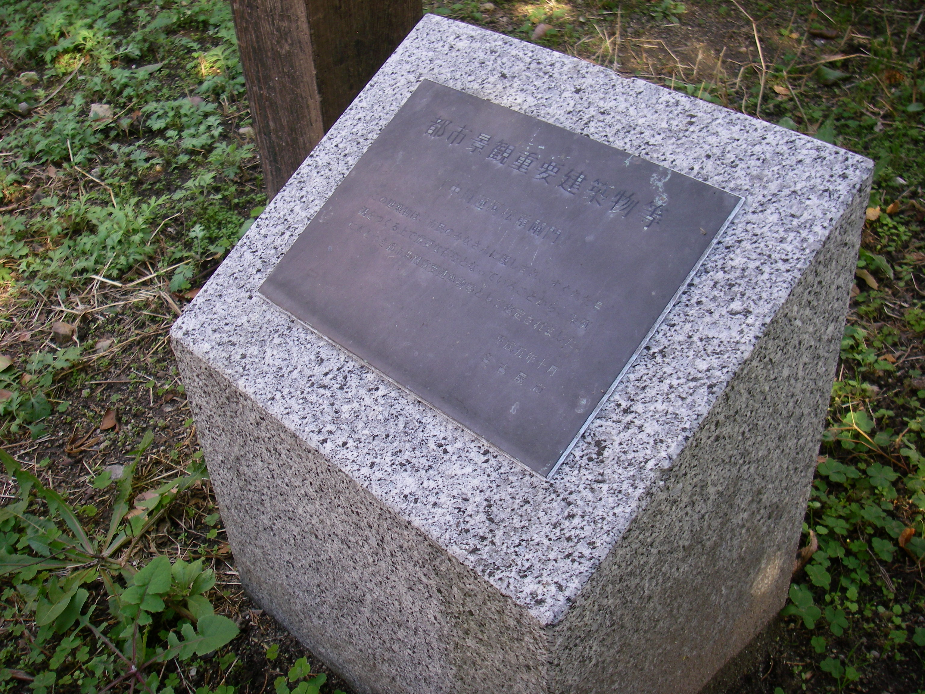 松重閘門（名古屋市中川区） 松重閘門公園内にある、名古屋市都市景観重要建築物等に指定されている旨を記した碑。